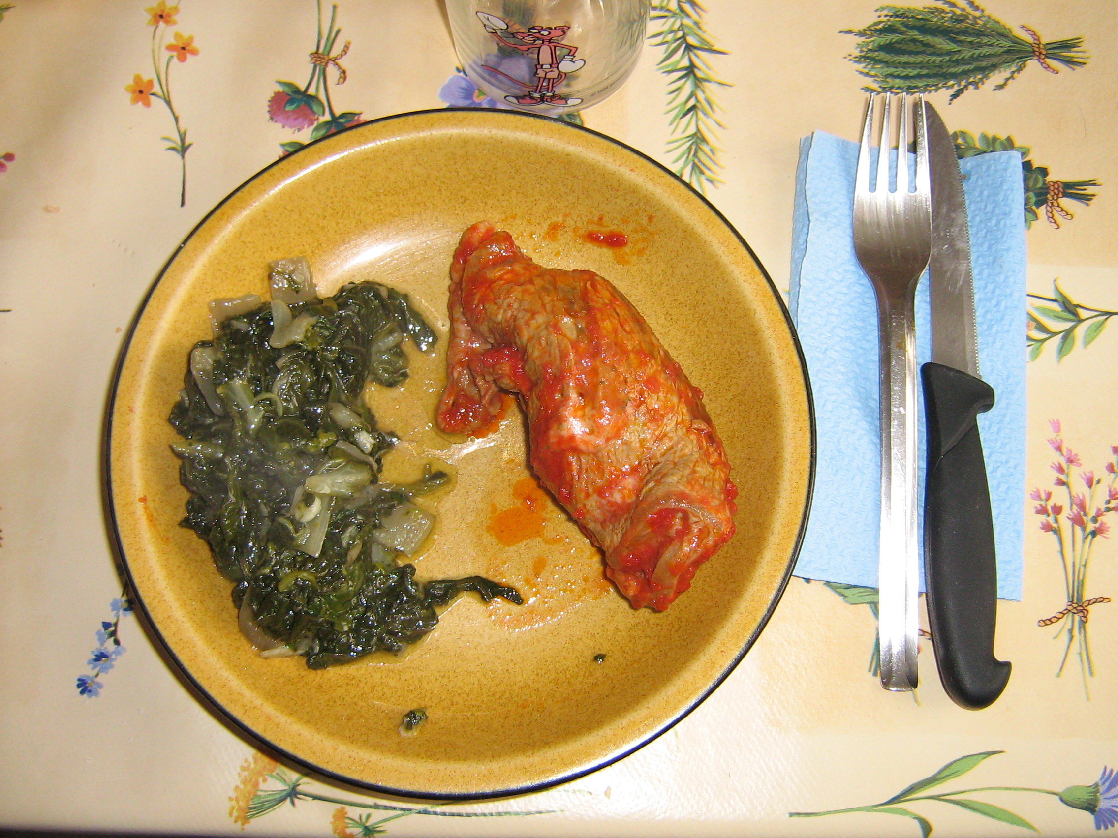 Secondi